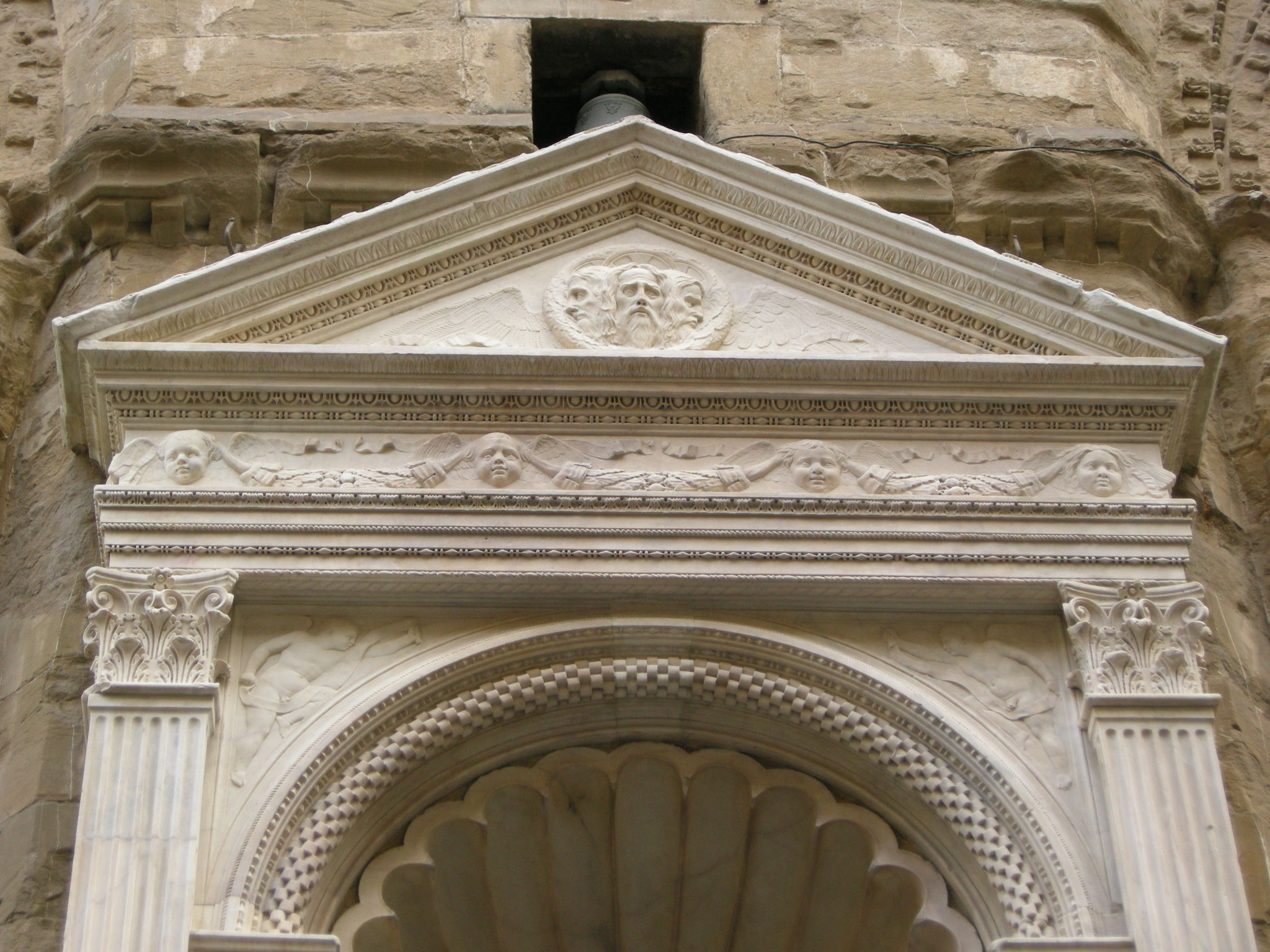 Orsanmichele, tabernacolo del tribunale di mercatanzia di donatello